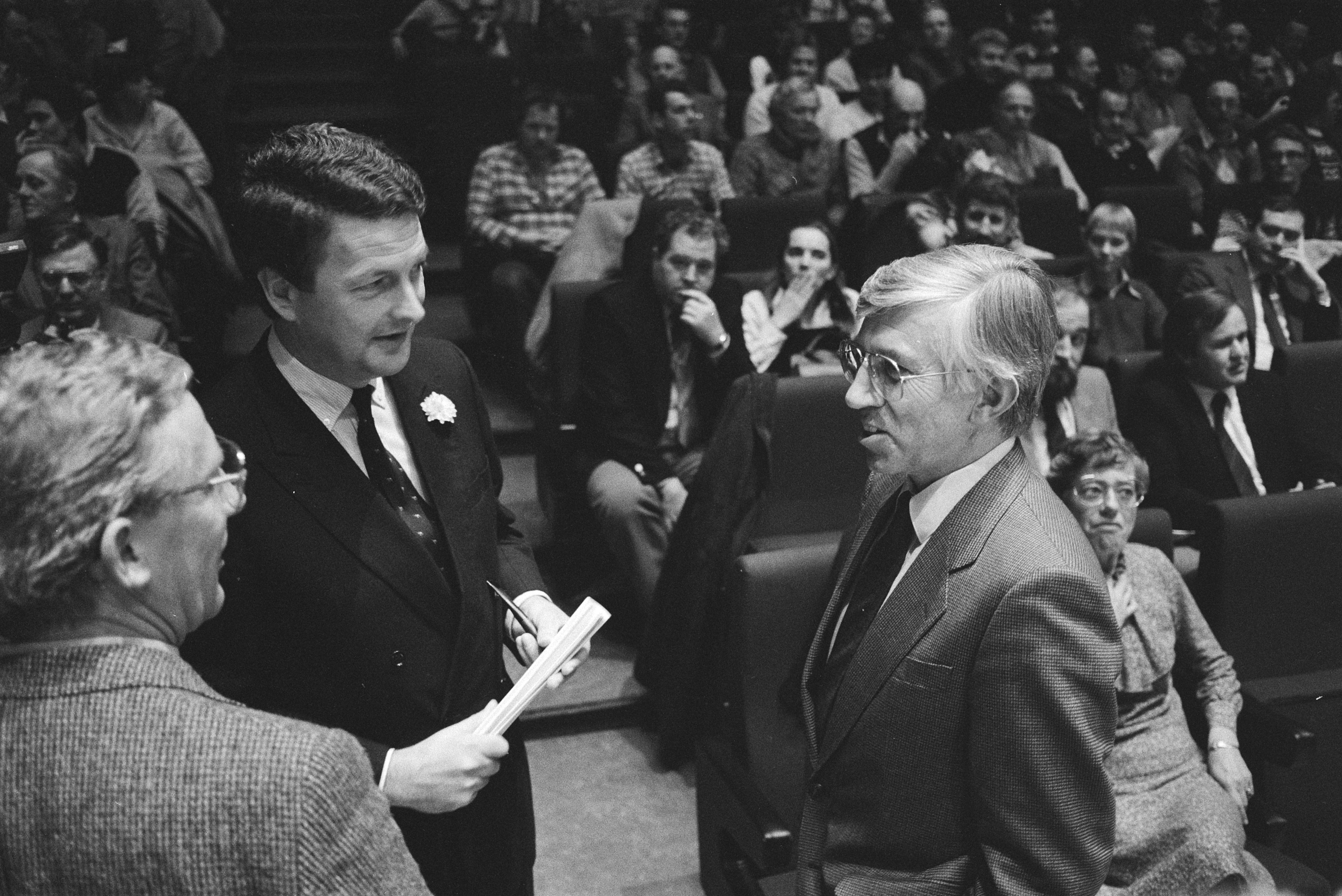 Massabijeenkomst personeel Wilton Fijenoord voor behoud werf; dir. Sluis (WF) met Kommer Damen (dir. Damen scheepswerf ). Datum 20 februari 1984